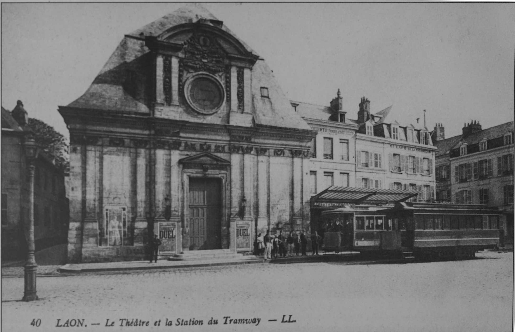 vue de Ancienne église Saint-Remy-au-Velours .